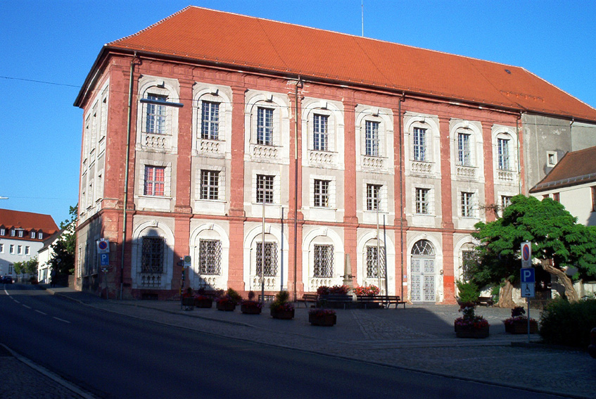 Neustadt a.d. Waldnaab - Deutschland/BY